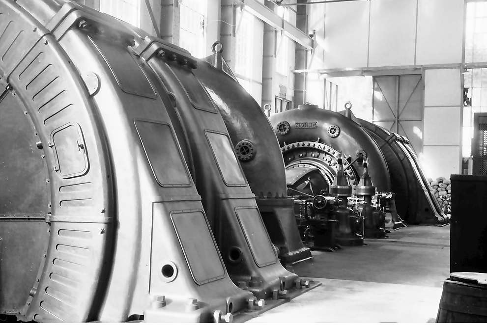 Kraftwerk Eichholz Generator - Turbine Maschinensatz I, Turbine - Generator Maschinensatz II